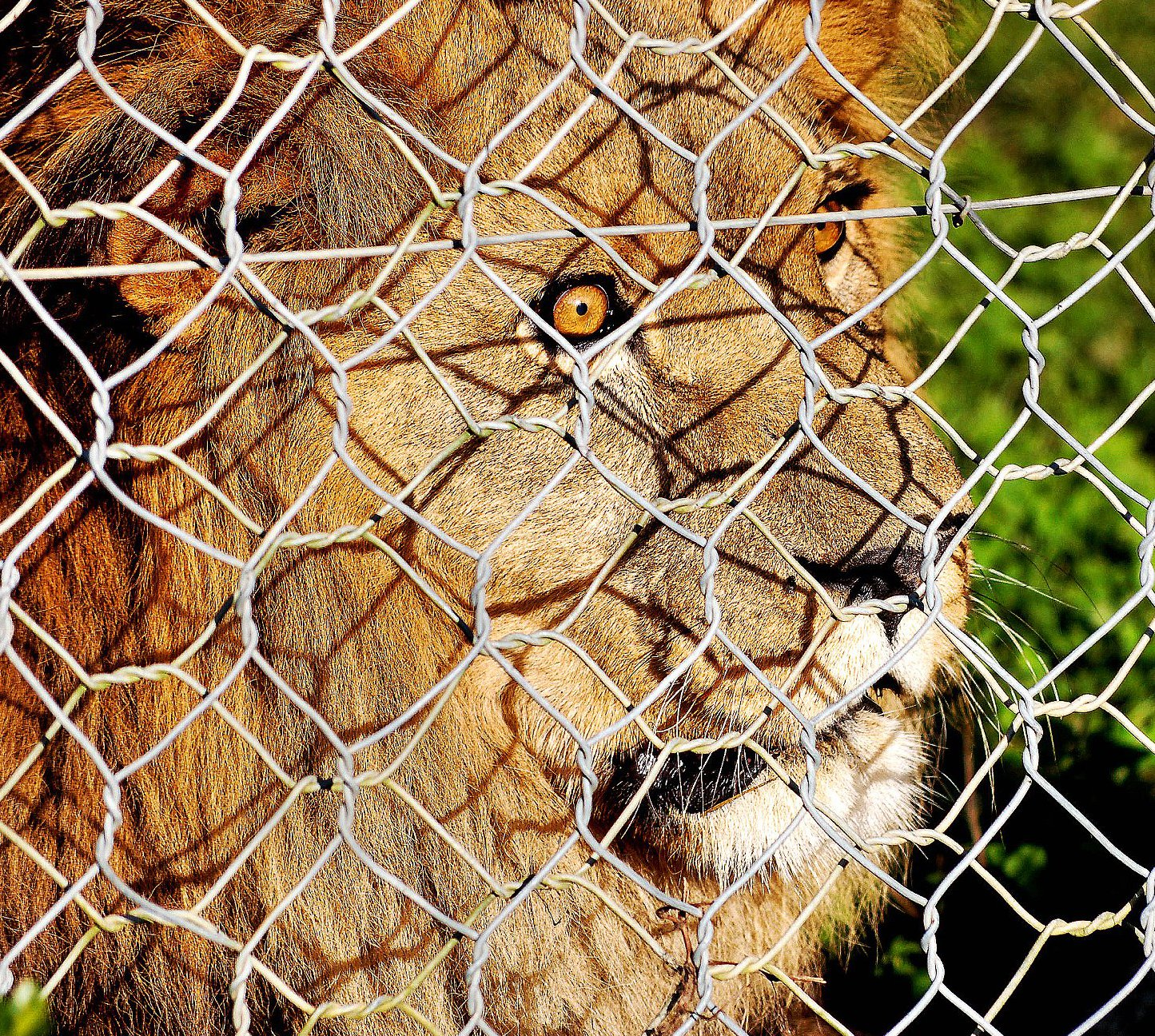 Lev v Zoo, Ljubljana